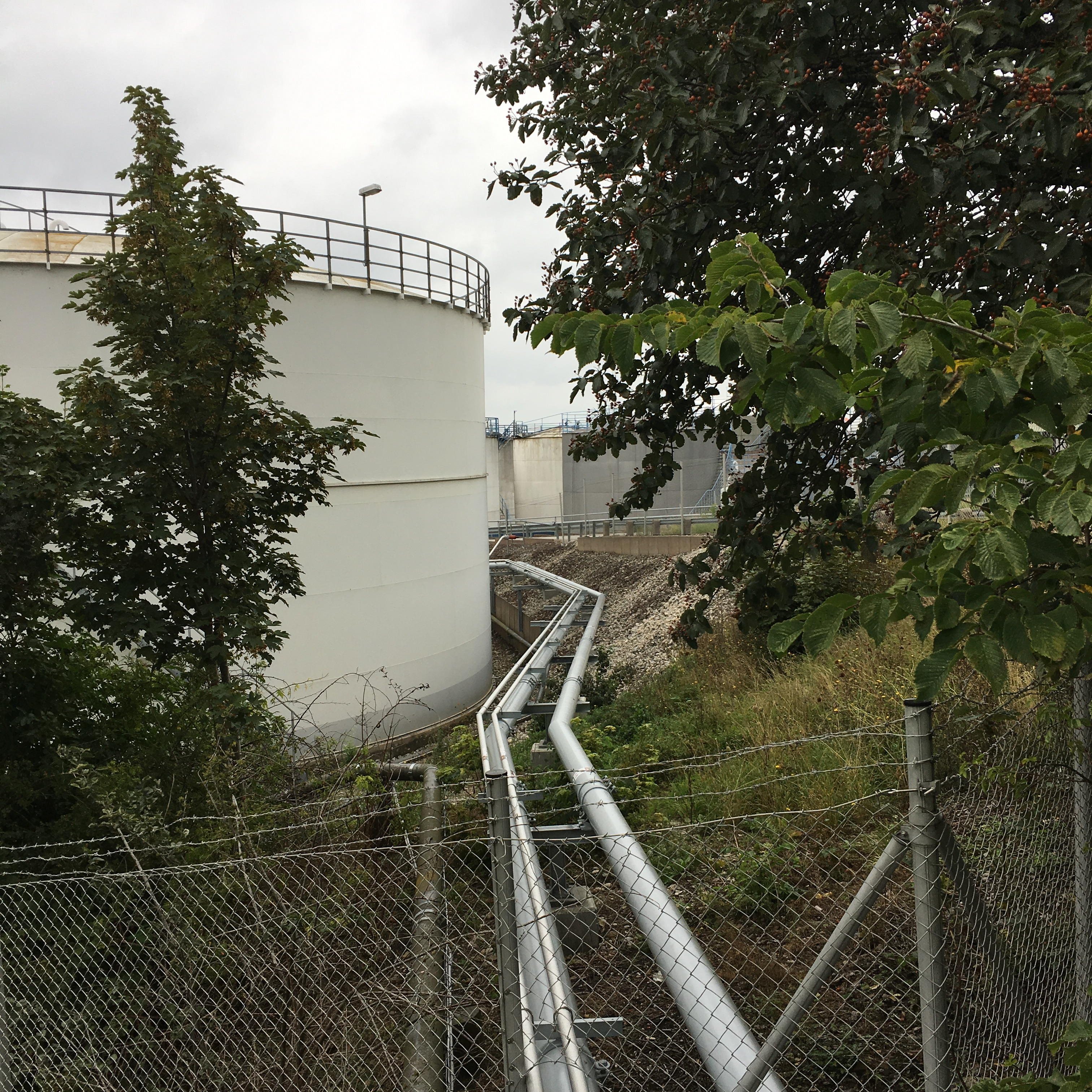 Rör och cisterner